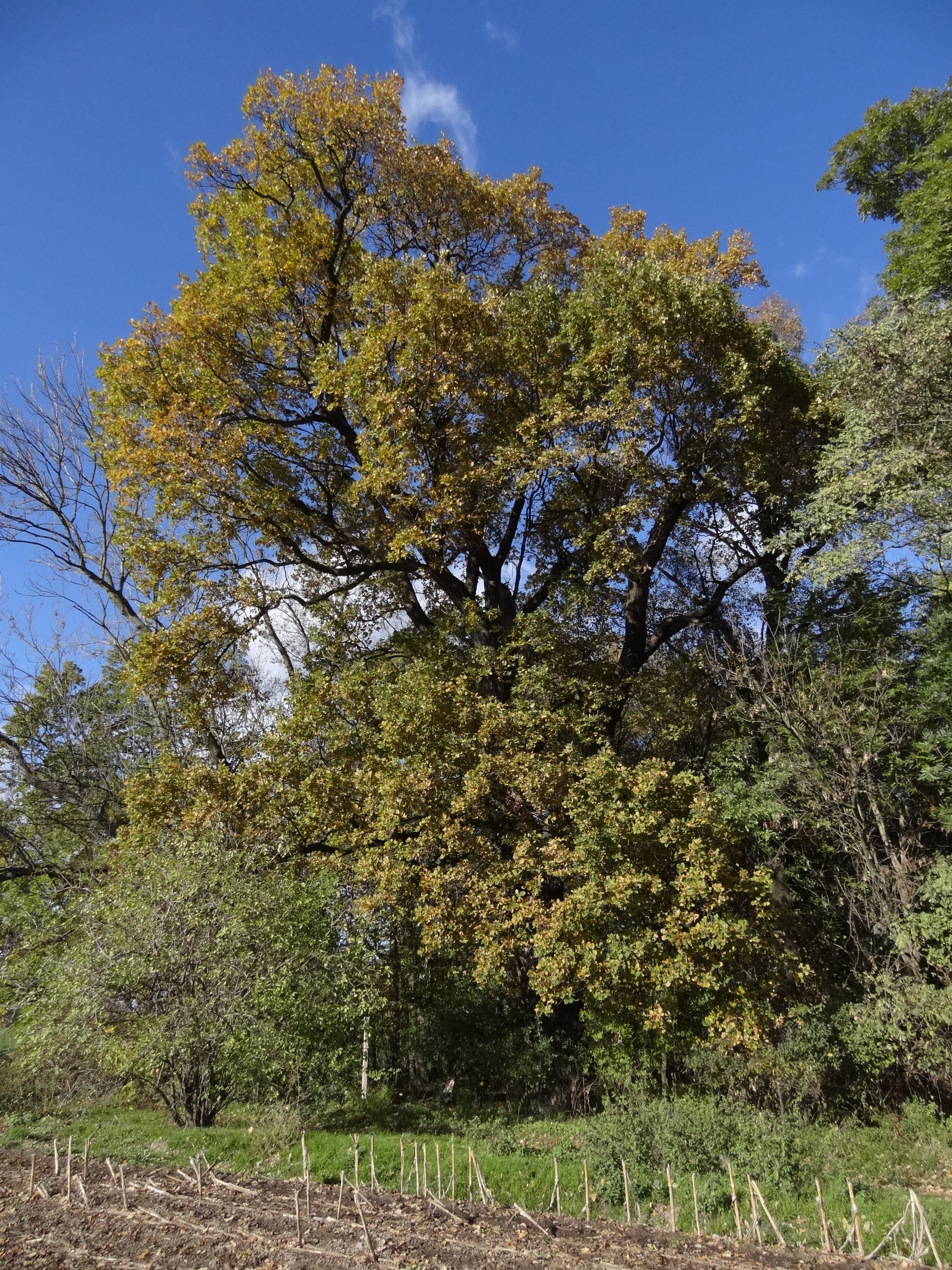 Cholupice - památné duby letní na jižním okraji Cholupické bažantnice